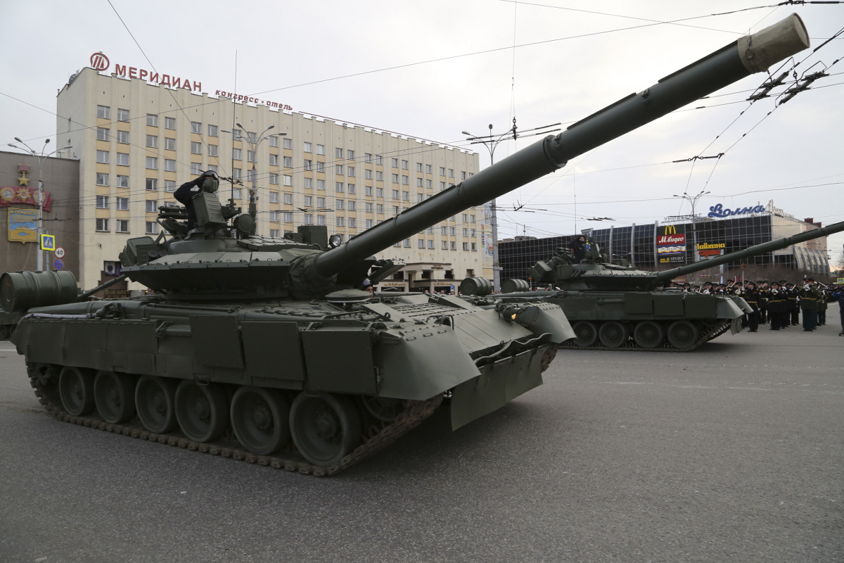 Т-80БВМ. Предгенеральные репетиции военных парадов в Мурманске и Североморске.